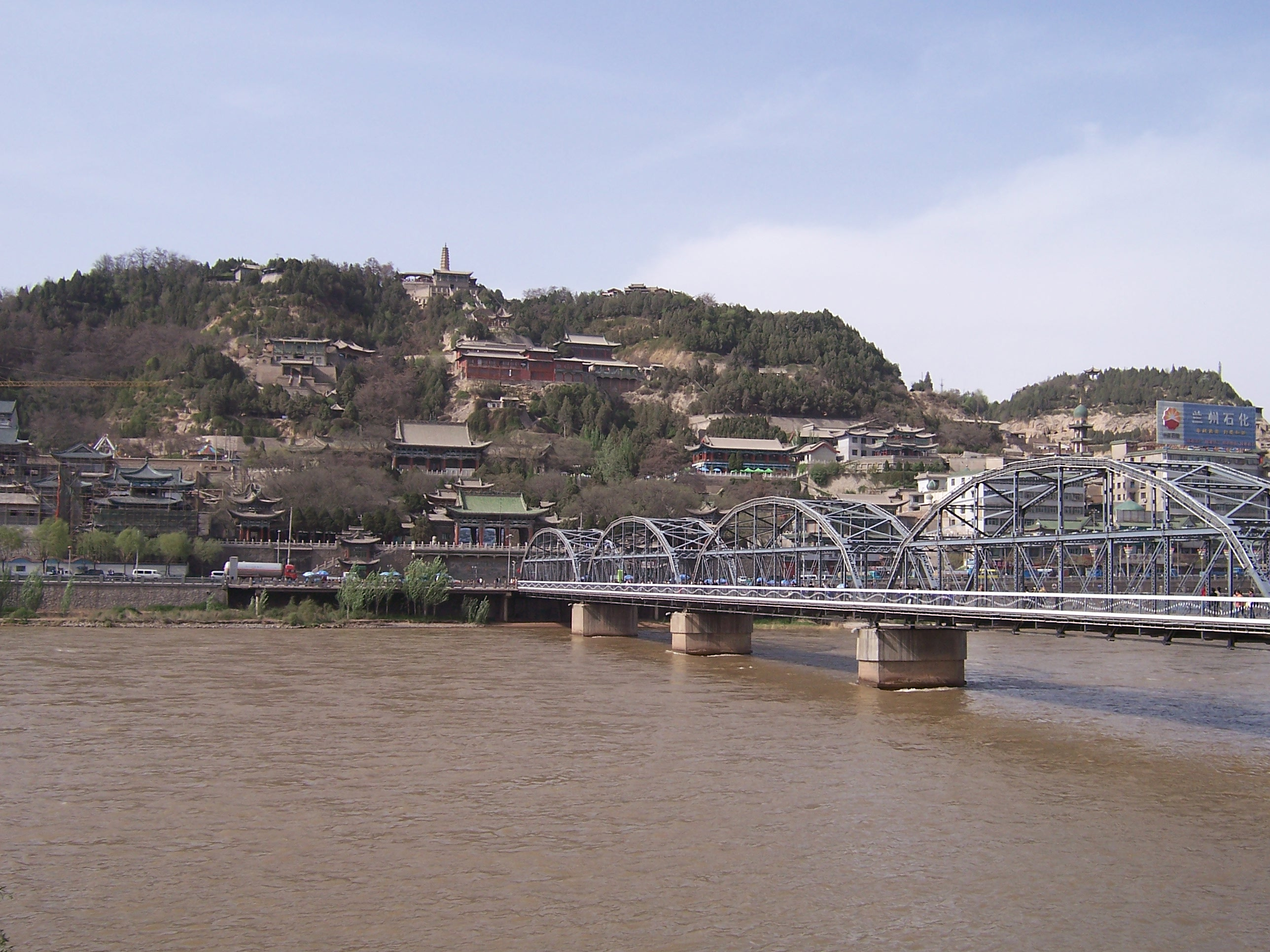 Lanzhou - Ponte Zhongshan sul fiume Giallo